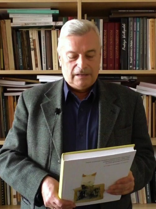 Prof. Andrzej Buko, archeolog.